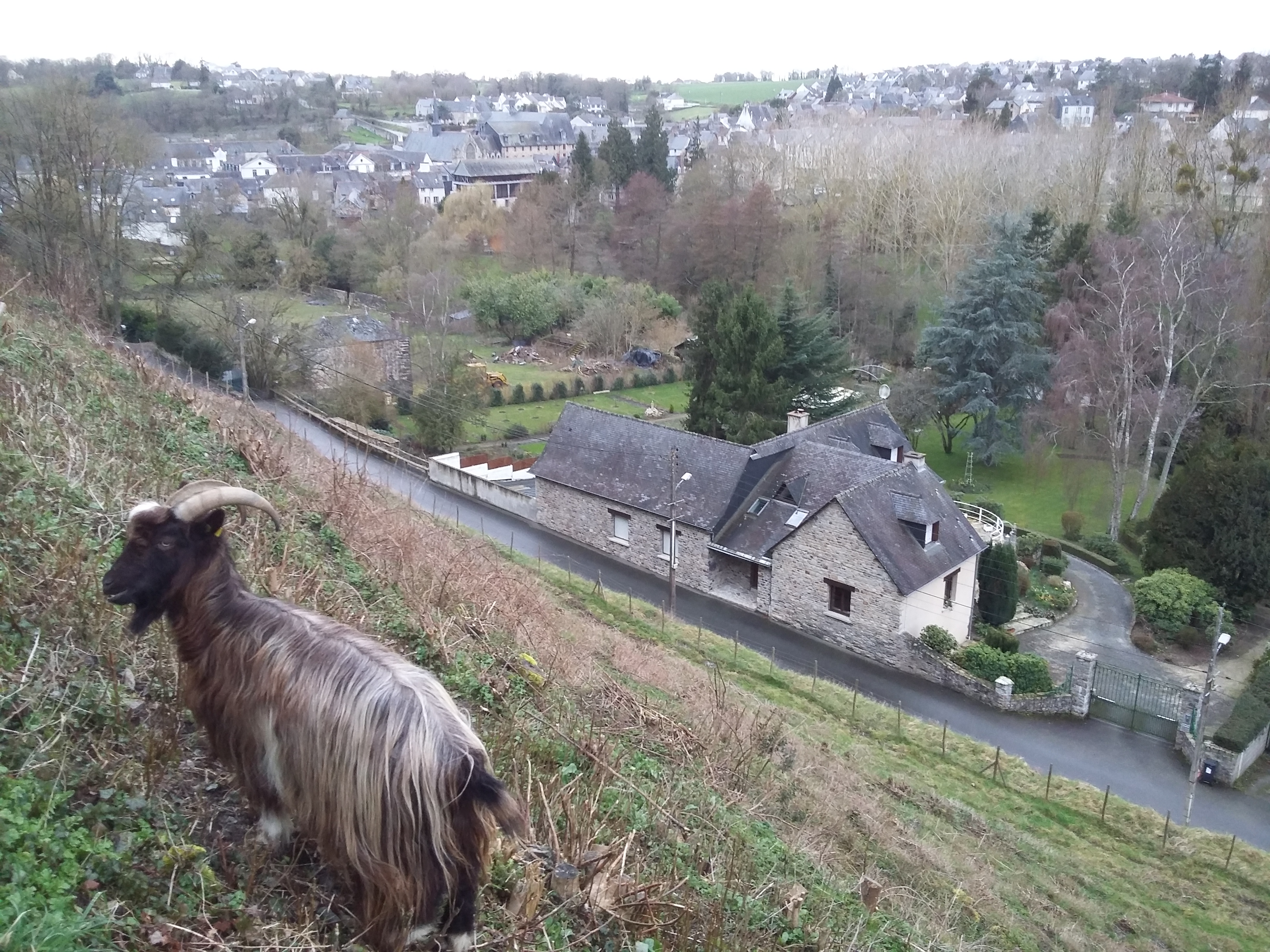 L'entretien du coteau de la vallée de la Vilaine, au pied des remparts est réalisé par des chèvres.